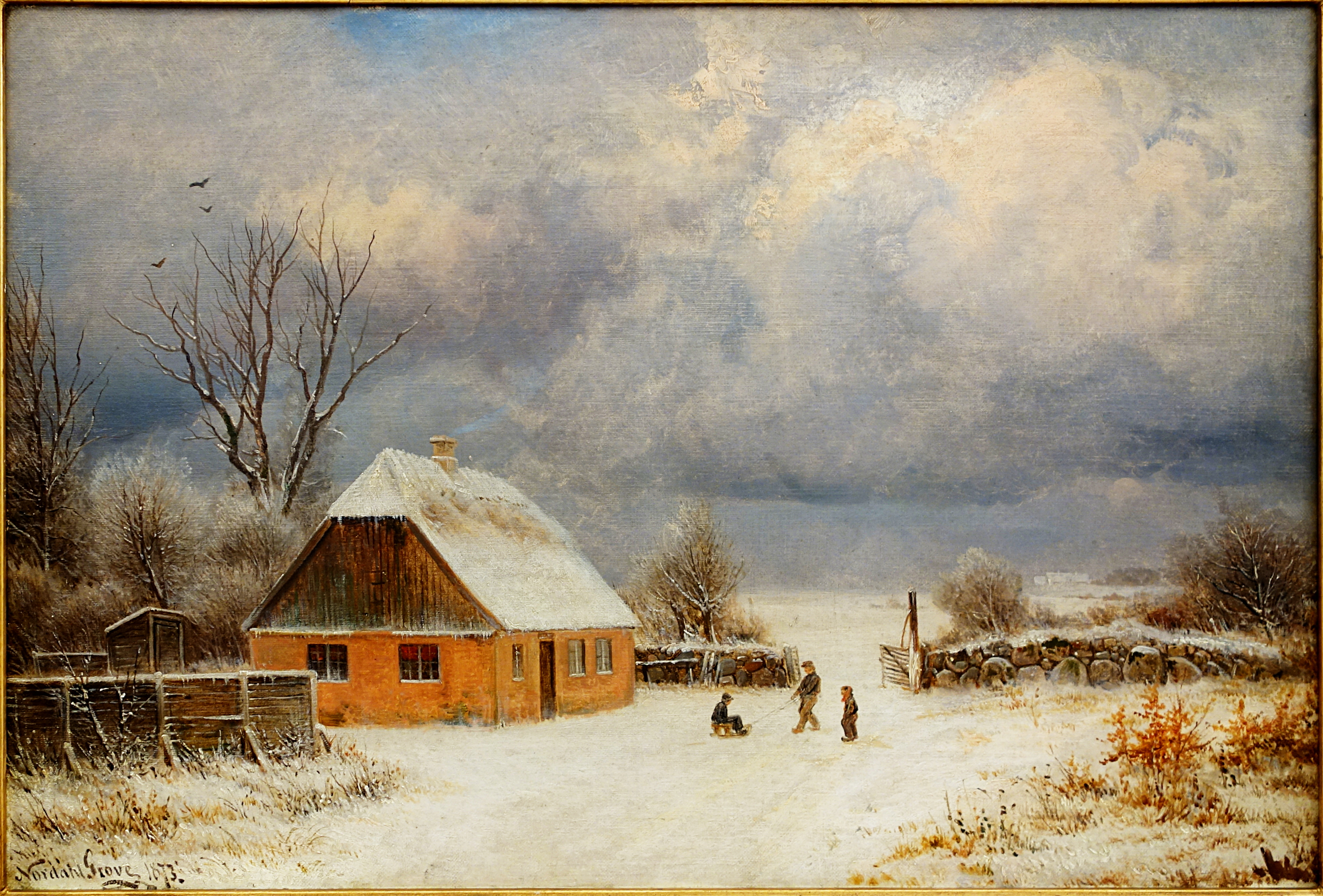 Paysage enneigé avec enfants patinant devant une ferme, collection privée